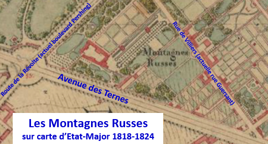 Montagnes russes ouvertes en 1816 dans le quartier des Ternes